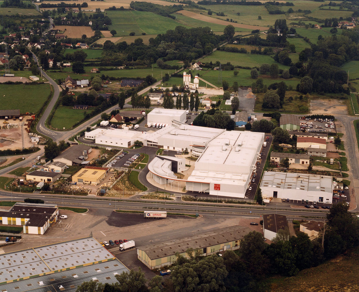 Vue aérienne de la zone d'activité Varennes-Vauzelles / Garchizy. Au premier plan, locaux d ela société TEXTILOT (conception / commercialisation de vêtements). Cliché libre de droit publiable moyennant la mention à la ville de Varennes-Vauzelles.